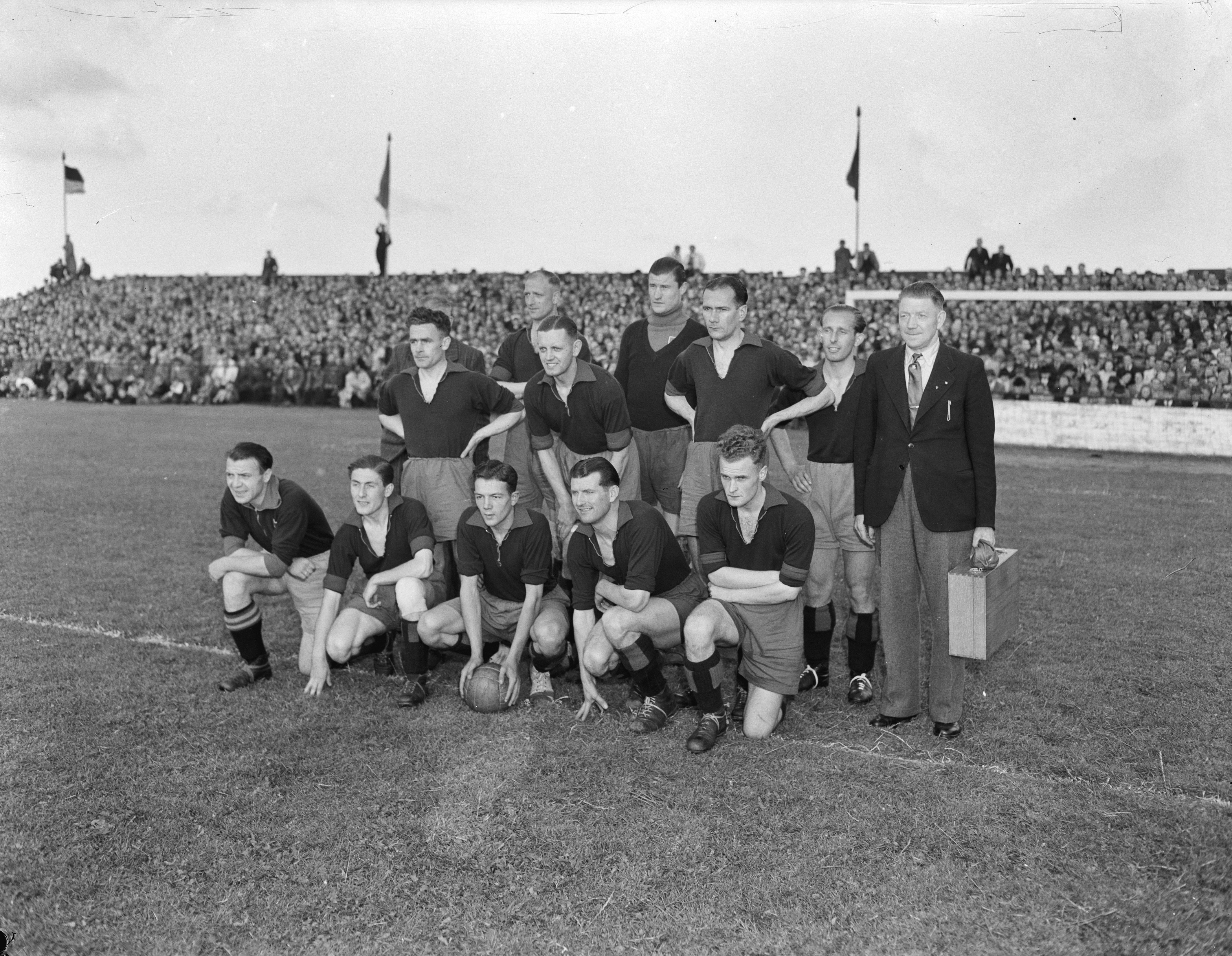 Collectie / Archief : Fotocollectie Anefo Reportage / Serie : [ onbekend ] Beschrijving : Voetbal. Haarlem, kampioen van Nederland. Elftal Annotatie : Door een overwinning van 2-0 op Heerenveen Datum : 17 juli 1946 Locatie : Heemstede Trefwoorden : groepsportretten, kampioenen, voetbal Fotograaf : Raucamp, Koos / Anefo Auteursrechthebbende : Nationaal Archief Materiaalsoort : Negatief (zwart/wit) Nummer archiefinventaris : bekijk toegang 2.24.01.04 Bestanddeelnummer : 901-8570